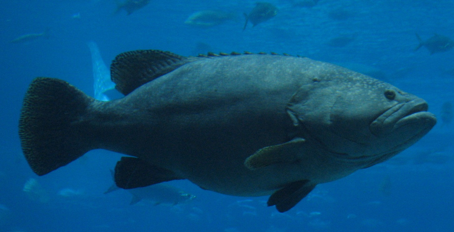 giant grouper, Georgia Aquarium, Atlanta / 2008